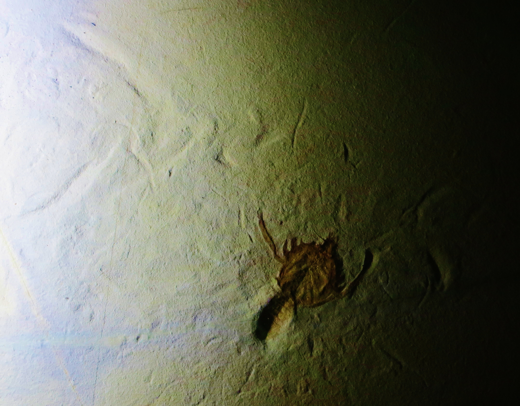 Fossil of Eryon, an extinct arthropod- Took the photo at Museo di Storia Naturale di Venezia